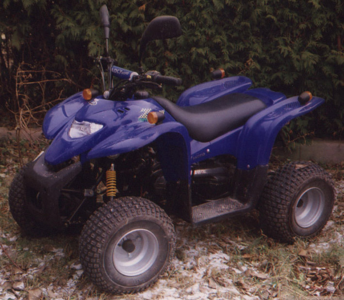 Der "Z1" von Adly in der 50ccm Version, seit 2000 mit allgemeiner EU-Genehmigung!